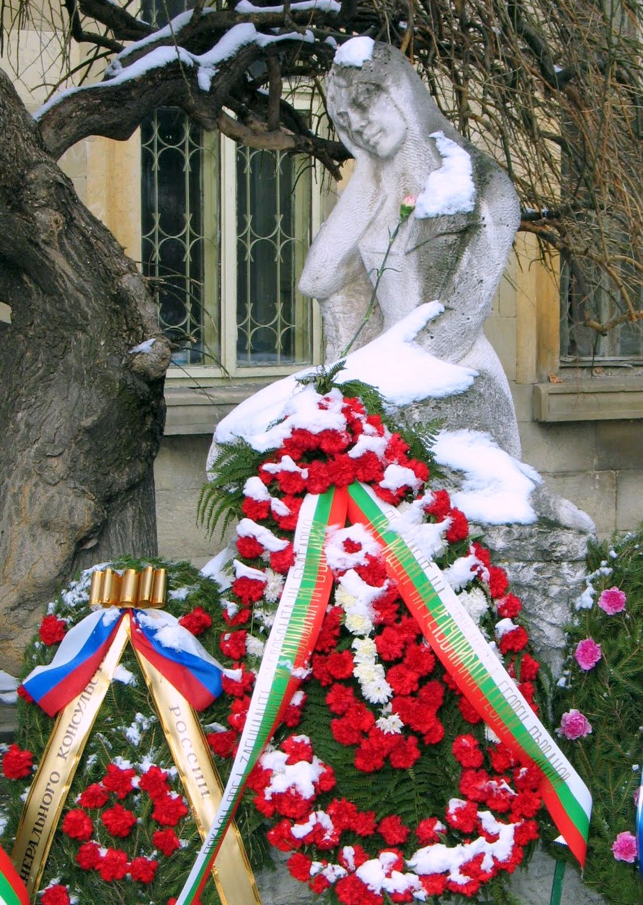 Паметник на баронеса Юлия Вревская, работила като милосърдна сестра в 48-ма военна болница в гр. Бяла. Заболяла от остра форма на петнист тиф, умира на 24 януари 1878 г.